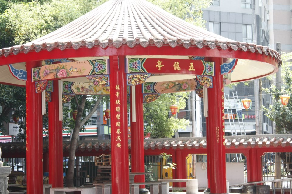 臺南後甲關帝殿五龍亭